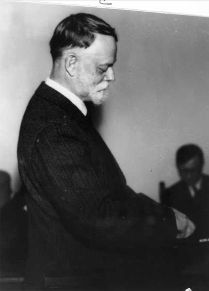 portrett, mann, jernbanedirektør, forfatter, stående halvfigur, profil.